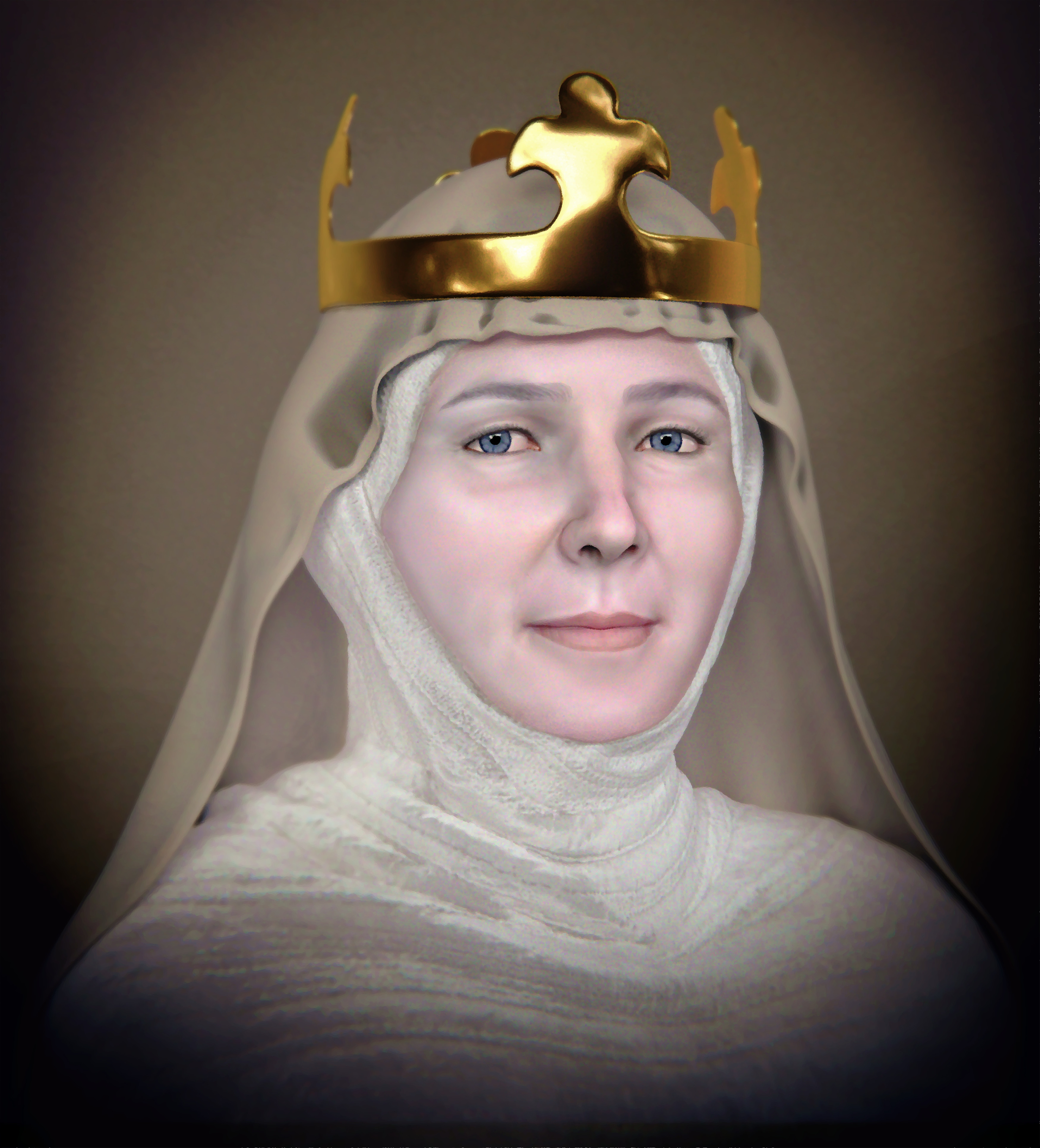 A reconstrução facial da rainha Judite da Turingia é um projeto organizado pelo arqueólogo Jiri Sindelar e o trabalho de modelagem foi executado pelo 3D designer Cicero Moraes.